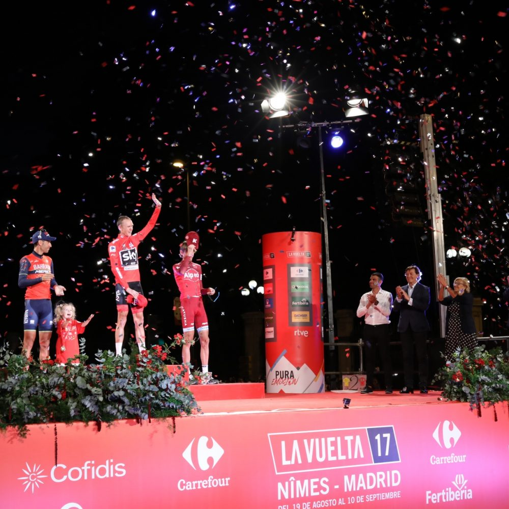 Pasadas las 21 horas del domingo 10 de septiembre, ha finalizado la 72 edición de la Vuelta Ciclista a España 2017 con la entrega de premios. La alcaldesa de Madrid, Manuela Carmena ha hecho entrega al ciclista italiano Matteo Trentin del trofeo al vencedor de la etapa final de la Vuelta (Arroyomolinos-Madrid). Durante el acto, la alcaldesa ha estado acompañada por el tercer teniente de alcalde, Mauricio Valiente, y el director general de Deportes del Ayuntamiento de Madrid, Javier Odriozola.